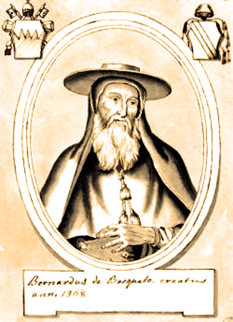 Cardinal Bertrand du Bosquet